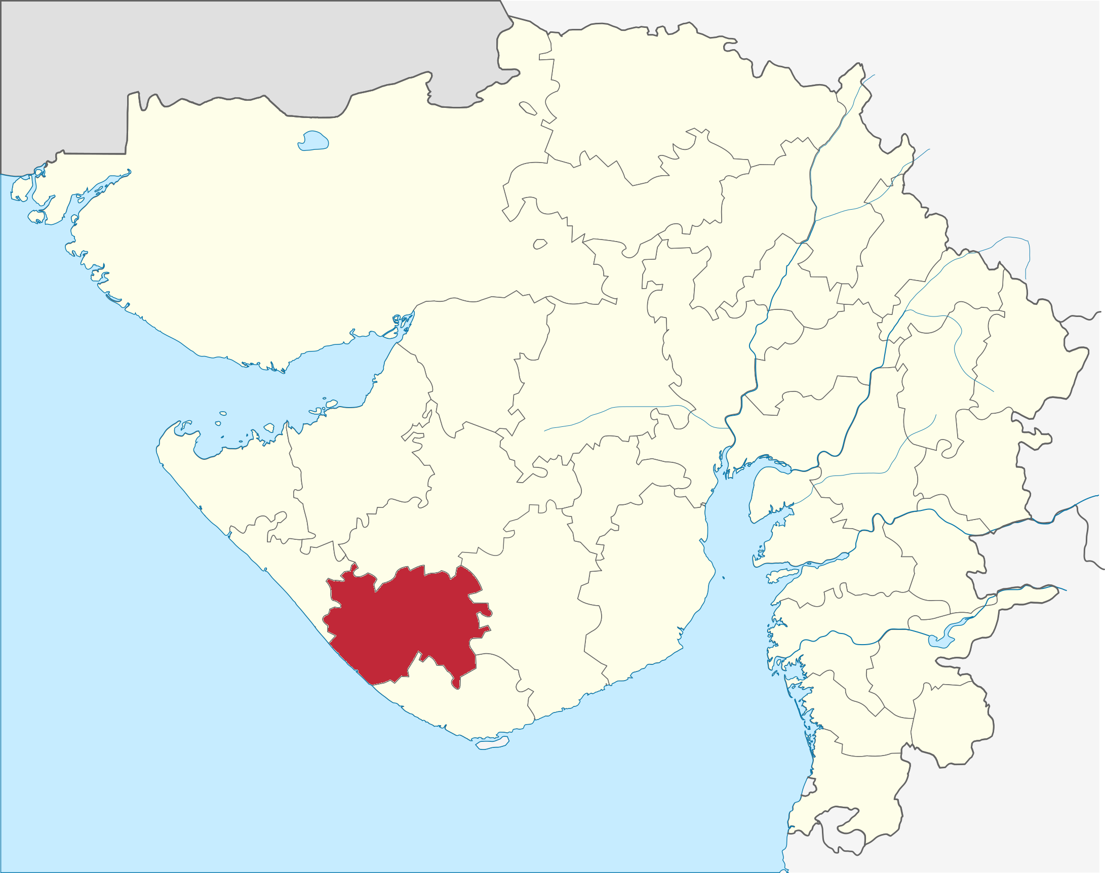 Distrito de Junagadh en Gujarat